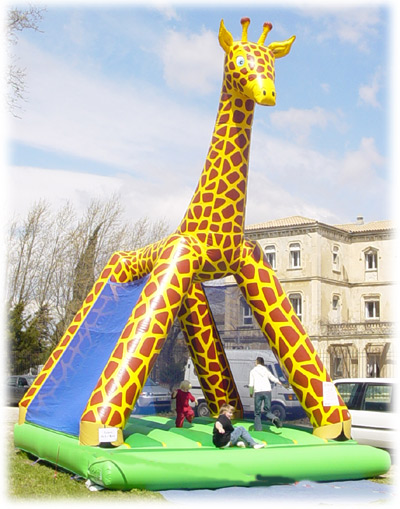 ASG 34